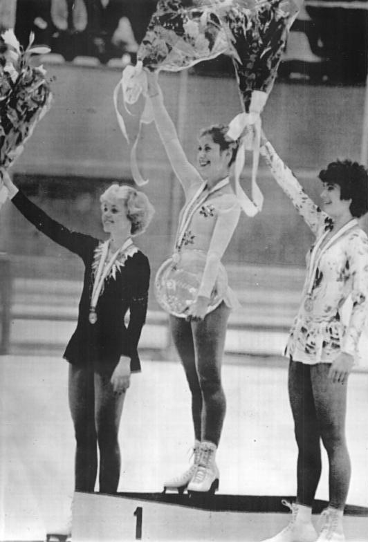 M. Thomas, D. Bielmann, K. Witt ADN-ZB UPI-Tele-29.11.80 Japan: Internationale Eiskunstlauf-Wettbewerbe- Die Damenkonkurrenz in der ehemaligen Olympiastadt Sapporo entschied die Schweizerin Denise Bielmann (M) vor Katarina Witt (DDR, r.) und Melissa Thomas (USA) zu ihren Gunsten.